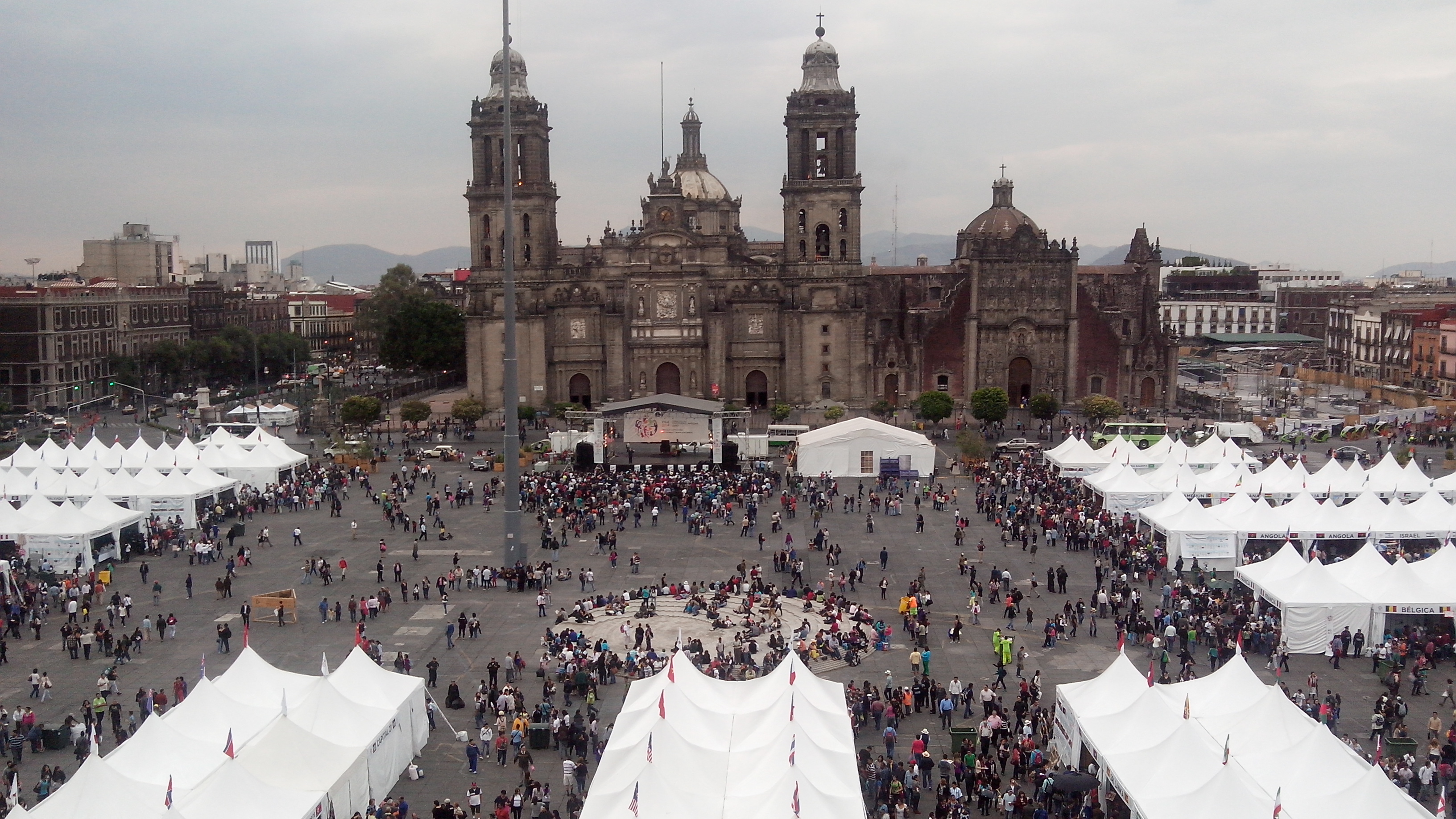 Con la Feria de las Culturas Amigas instalada — Plaza de la Constitución − Zócolo.